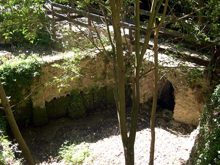 Vivarium (Viver) - detalle de los estanques de cria y engorde de peces en la época romana aprox. 200 a.C.